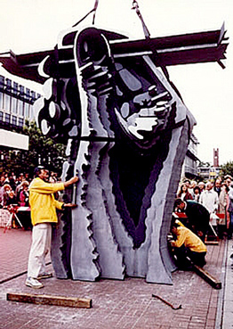 Klaus Kammerichs, Hand mit Stift, 1985, Skulptur vor der FH Düsseldorf